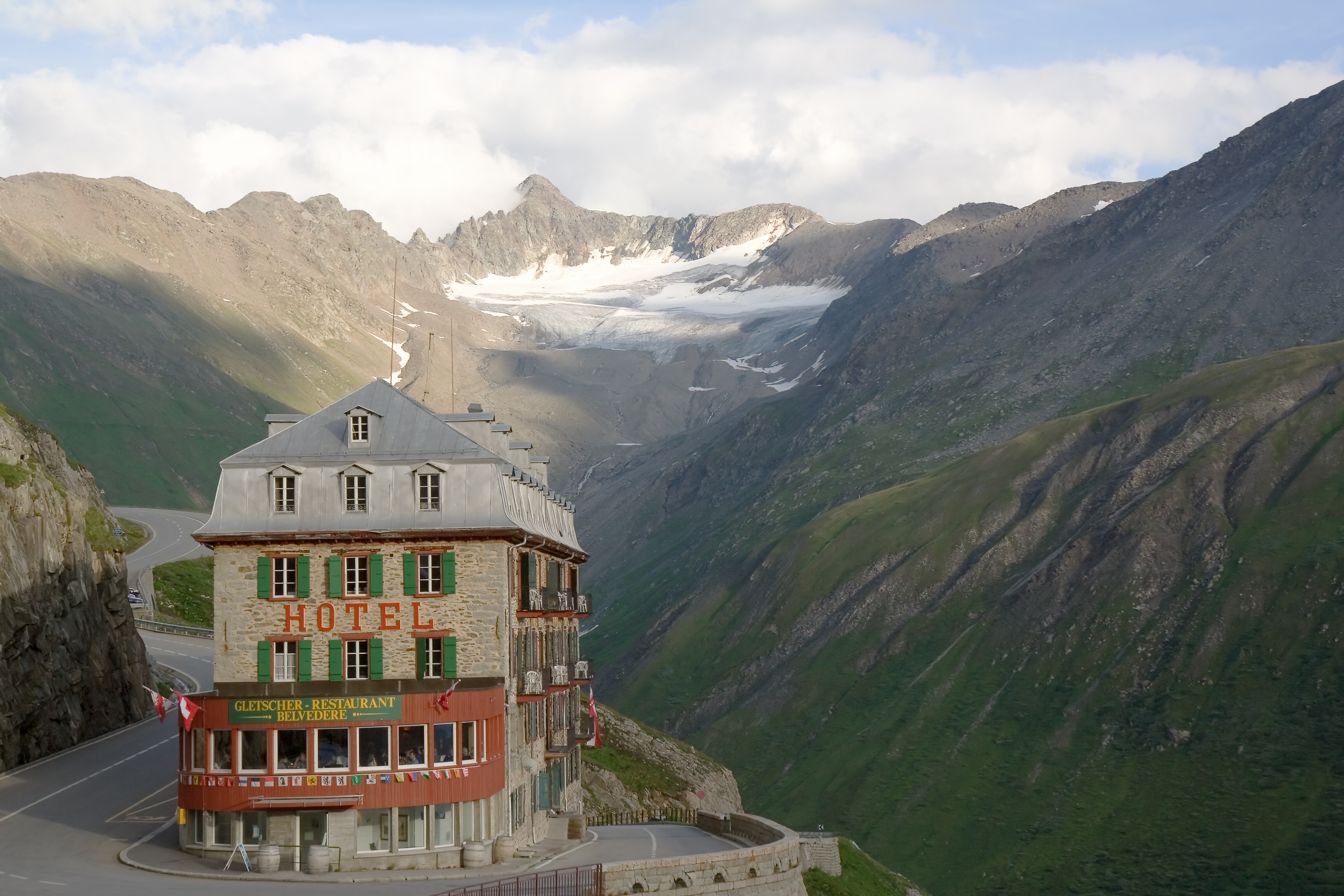 Hotel Belvédère beim Rhonegletscher an Furka Passstrasse, Schweiz